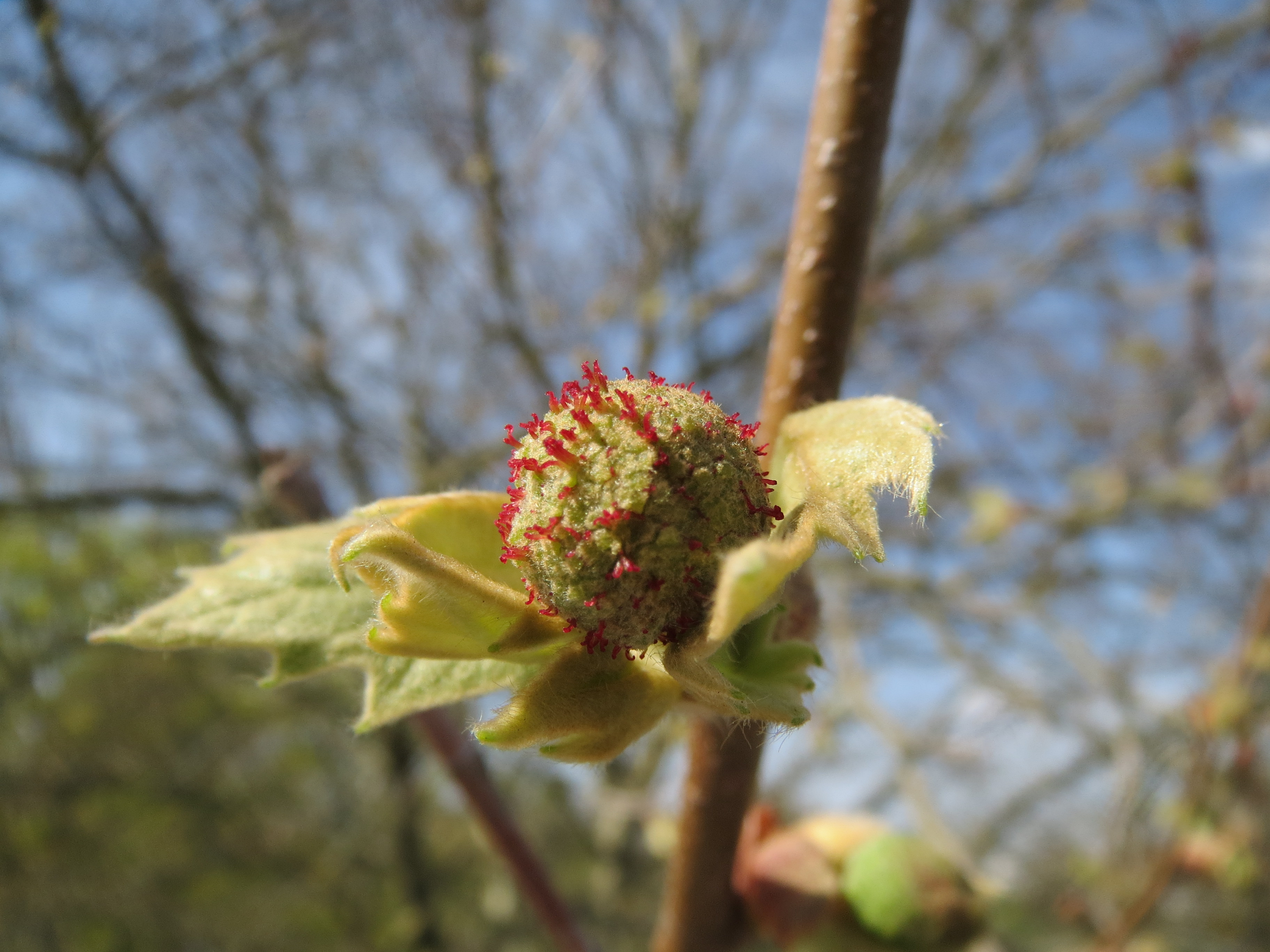 Platane (Platanus × hispanica) an der Saar in Saarbrücken